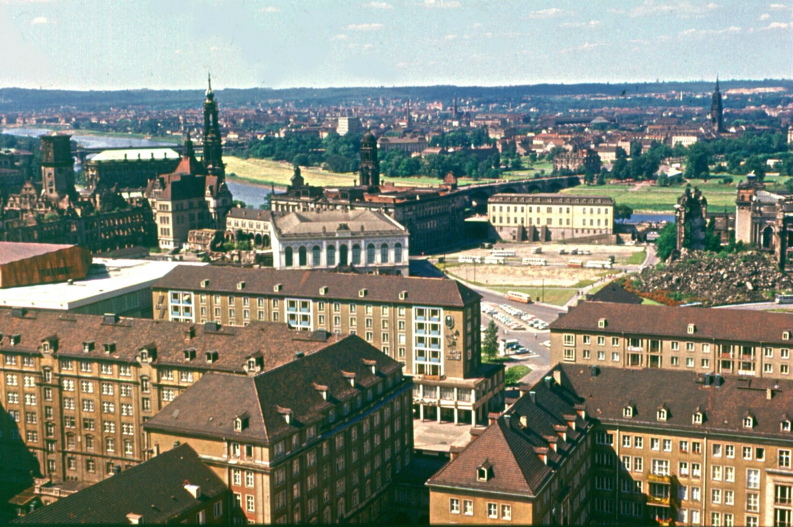 Dresden 1972. Blick vom Rathausturm über die Weiße Gasse zum Neumarkt mit Ruine der Frauenkirche